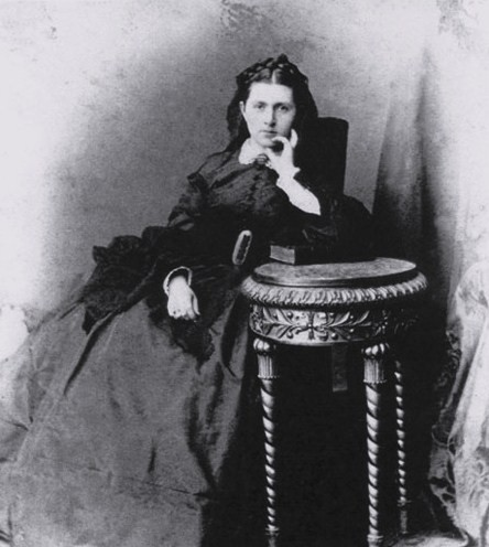 Графиня Александра Алексеевна Бобринская, ур. Писарева (1843—1905)